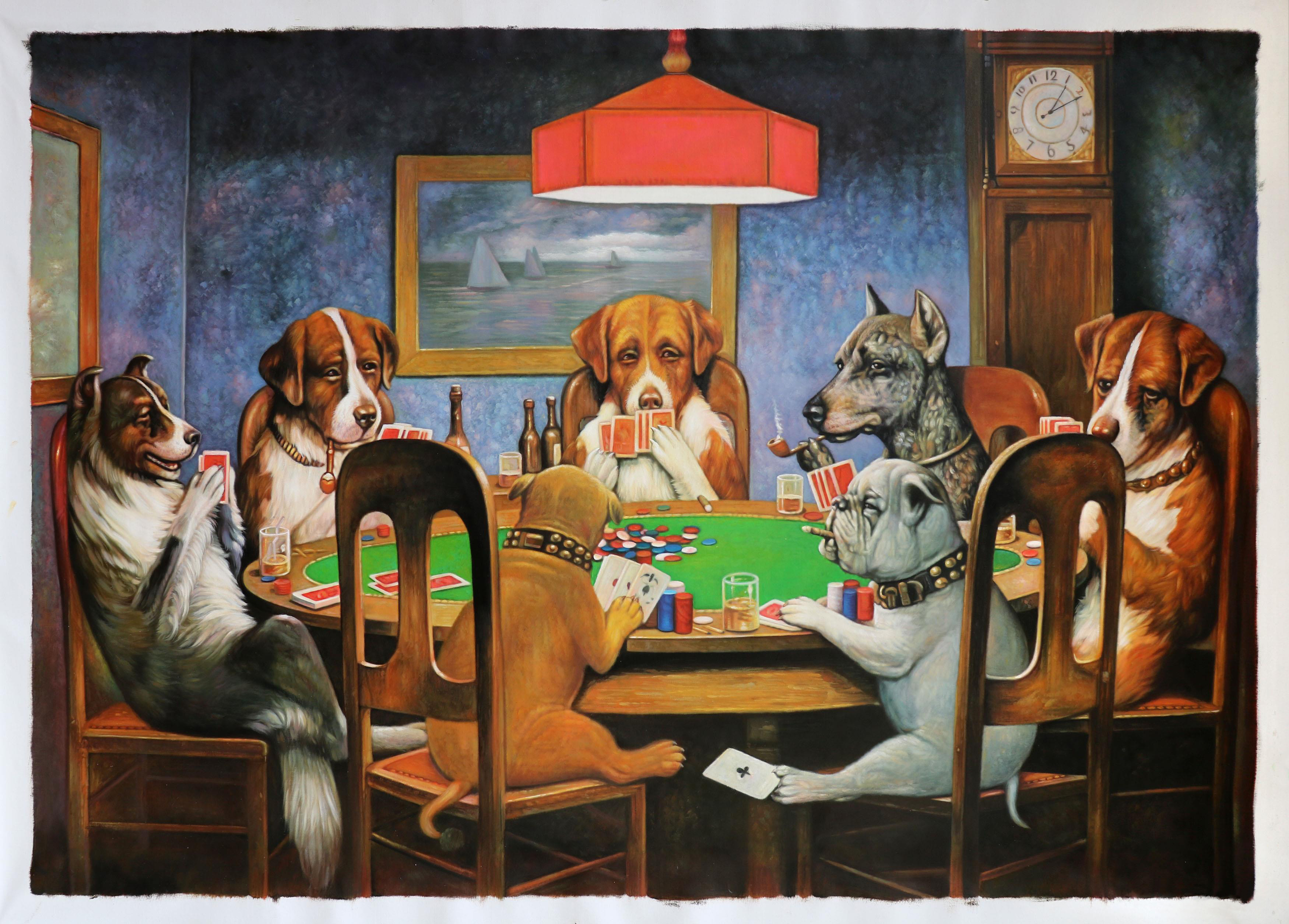 from Dogs Playing Poker